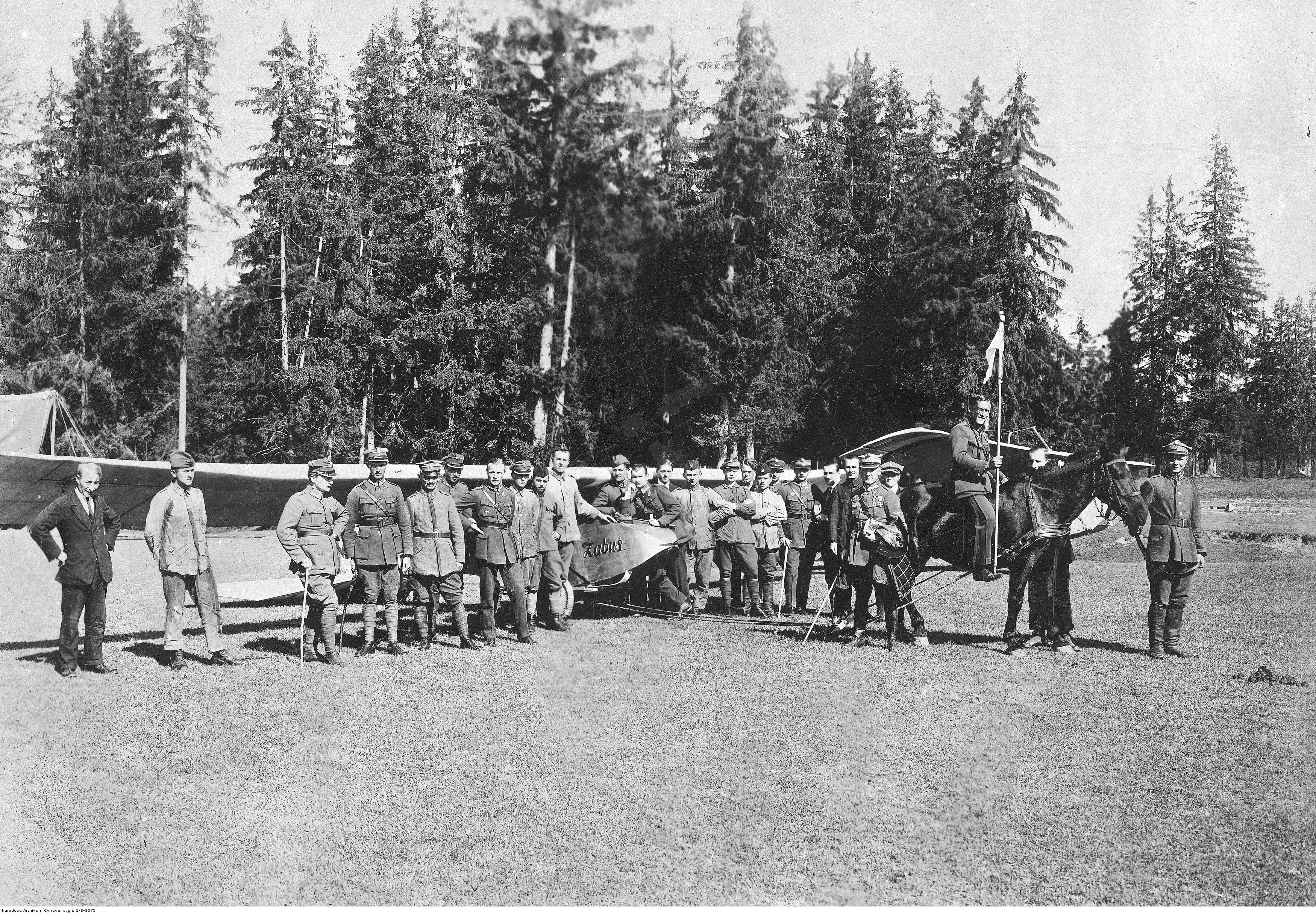 Wyprowadzanie szybowca „Żabuś” na linie startu